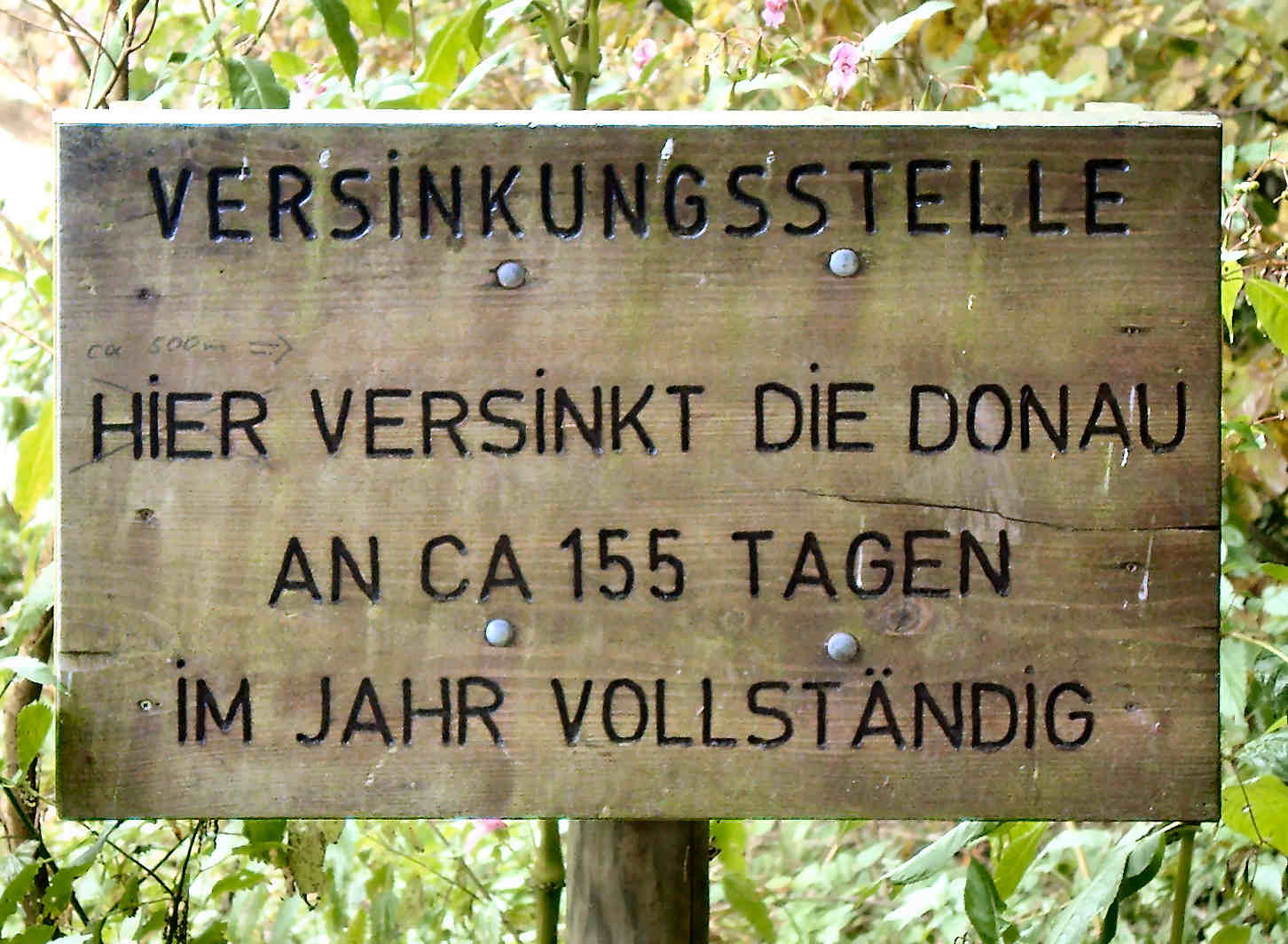 Donauversinkung bei Immendingen (Hinweisschild)